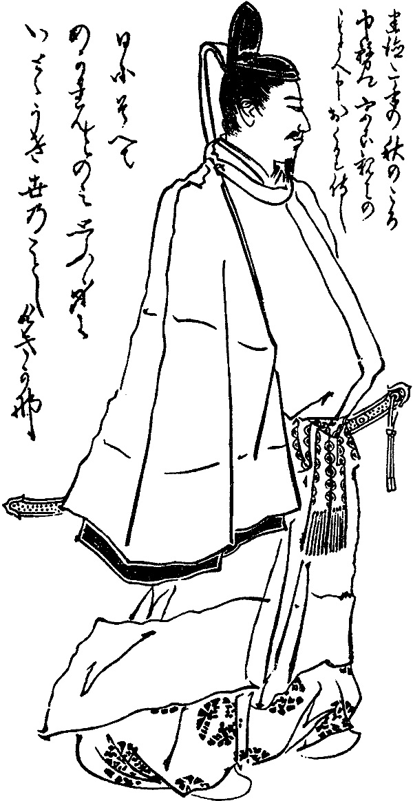 征西将軍宮懐良親王